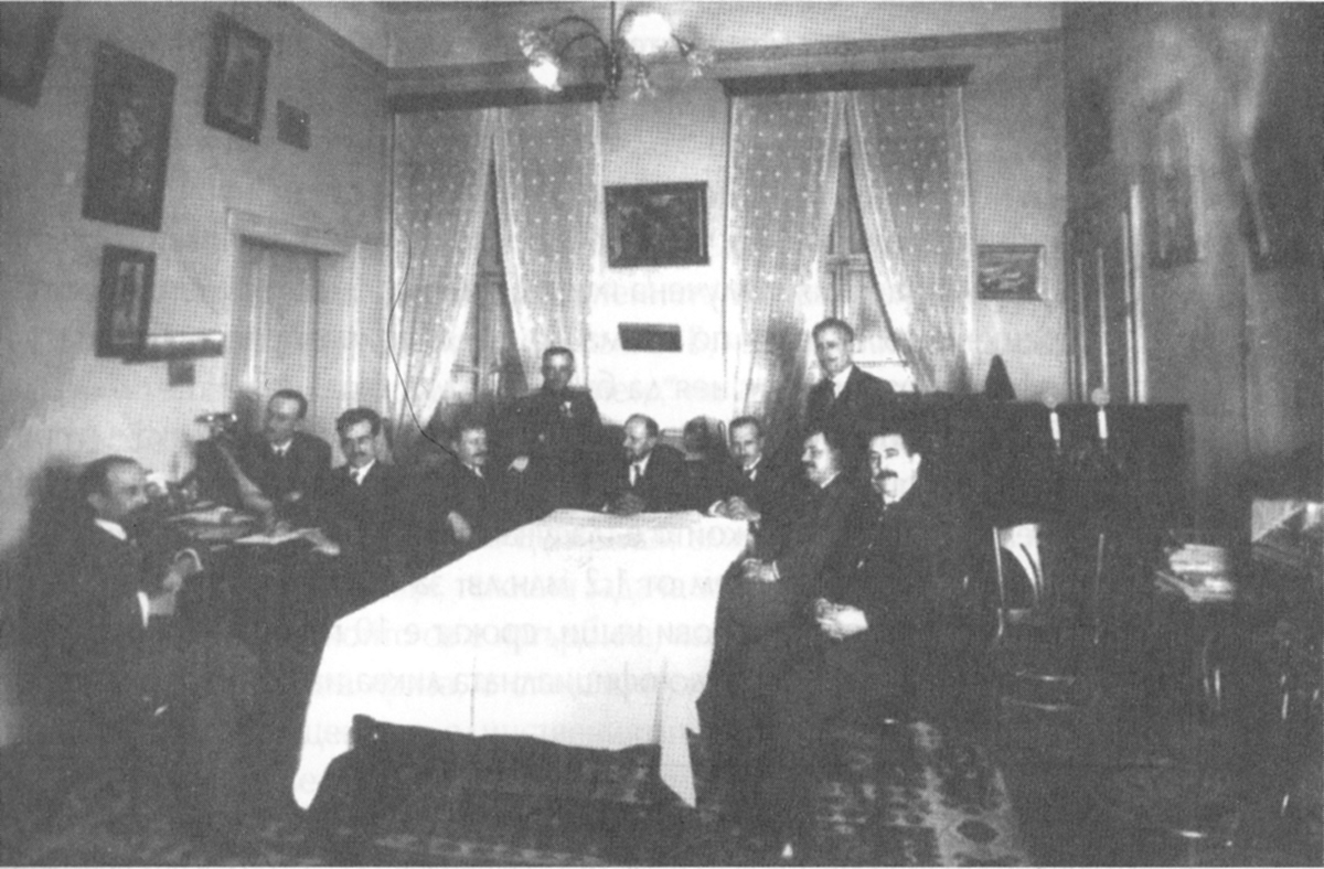 Ръководителите на Деветоюнския преврат в дома на Иван Русев (по-късна възстановка). От ляво надясно: Димо Казасов, Кимон Георгиев, Никола Рачев, Янаки Моллов, Иван Вълков, Александър Цанков, Христо Калфов, Иван Русев, Петър Тодоров, Цвятко Бобошевски